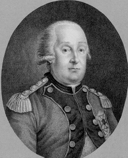 Karl II. August, nach einem Gemälde von Lauer, gestochen 1794 von Charles Langlois